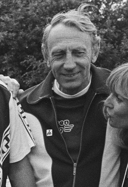 Collectie / Archief : Fotocollectie Anefo Reportage / Serie : [ onbekend ] Beschrijving : TV-opnamen "Sterrenslag" in Enschede; team deelnemers Datum : 11 augustus 1978 Locatie : Enschede Trefwoorden : deelnemers, opnamen, teams Fotograaf : Peters, Hans / Anefo Auteursrechthebbende : Nationaal Archief Materiaalsoort : Negatief (zwart/wit) Nummer archiefinventaris : bekijk toegang 2.24.01.05 Bestanddeelnummer : 929-8549